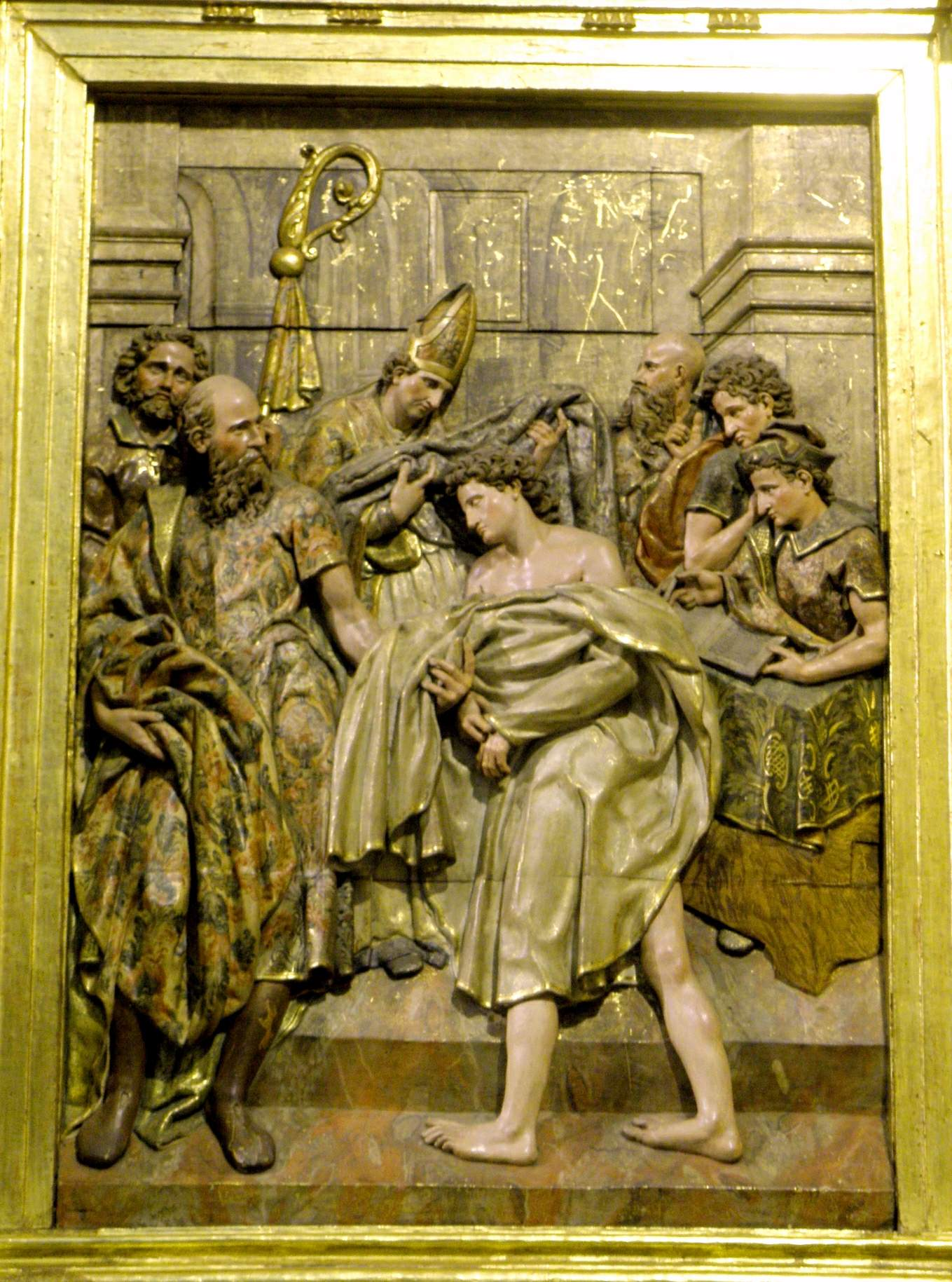 Retablo del altar mayor de la iglesia de San Francisco de Tolosa (Guipúzcoa)